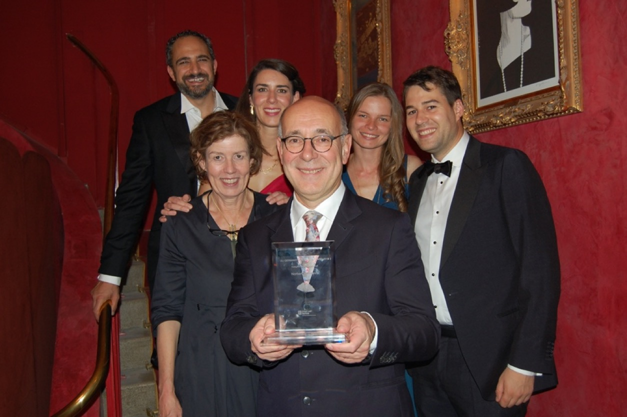 ULI Award Norbert Hermanns Guter Freund